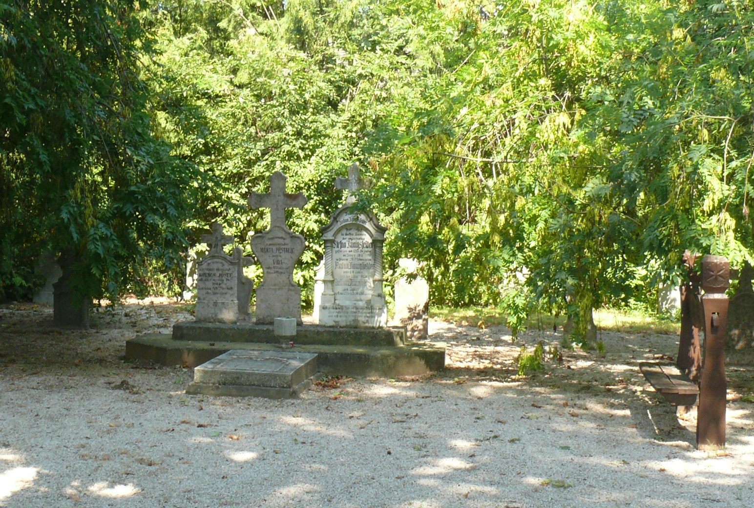 A vaskúti temetőben 1992-ben létesített sírkert részlete